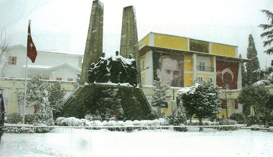 Bakırköy area